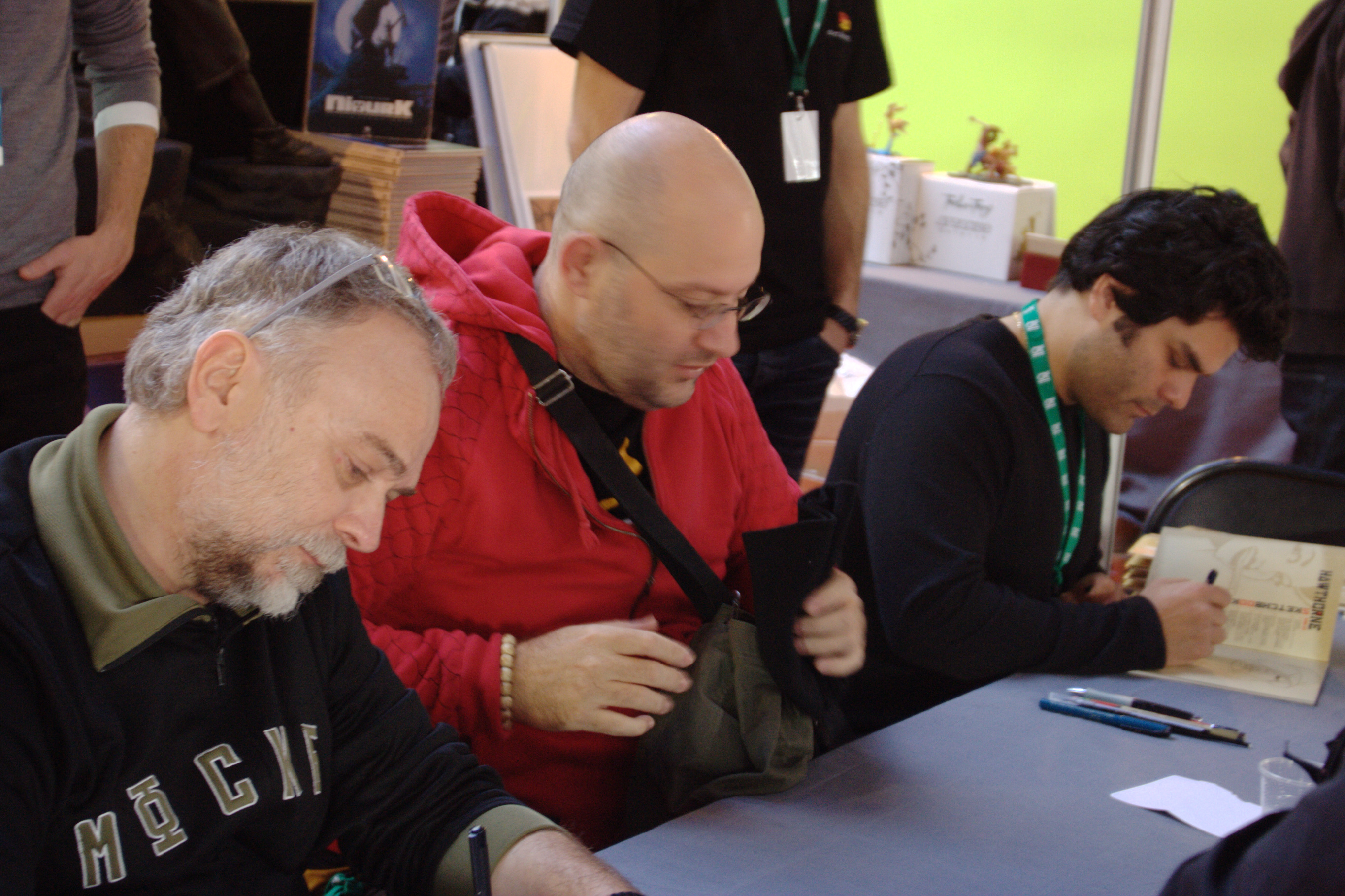 Olivier Vatine, Jean-David Morvan et Mike Hawthorne lors de Quai des Bulles à Saint-Malo le 27 octobre 2012.